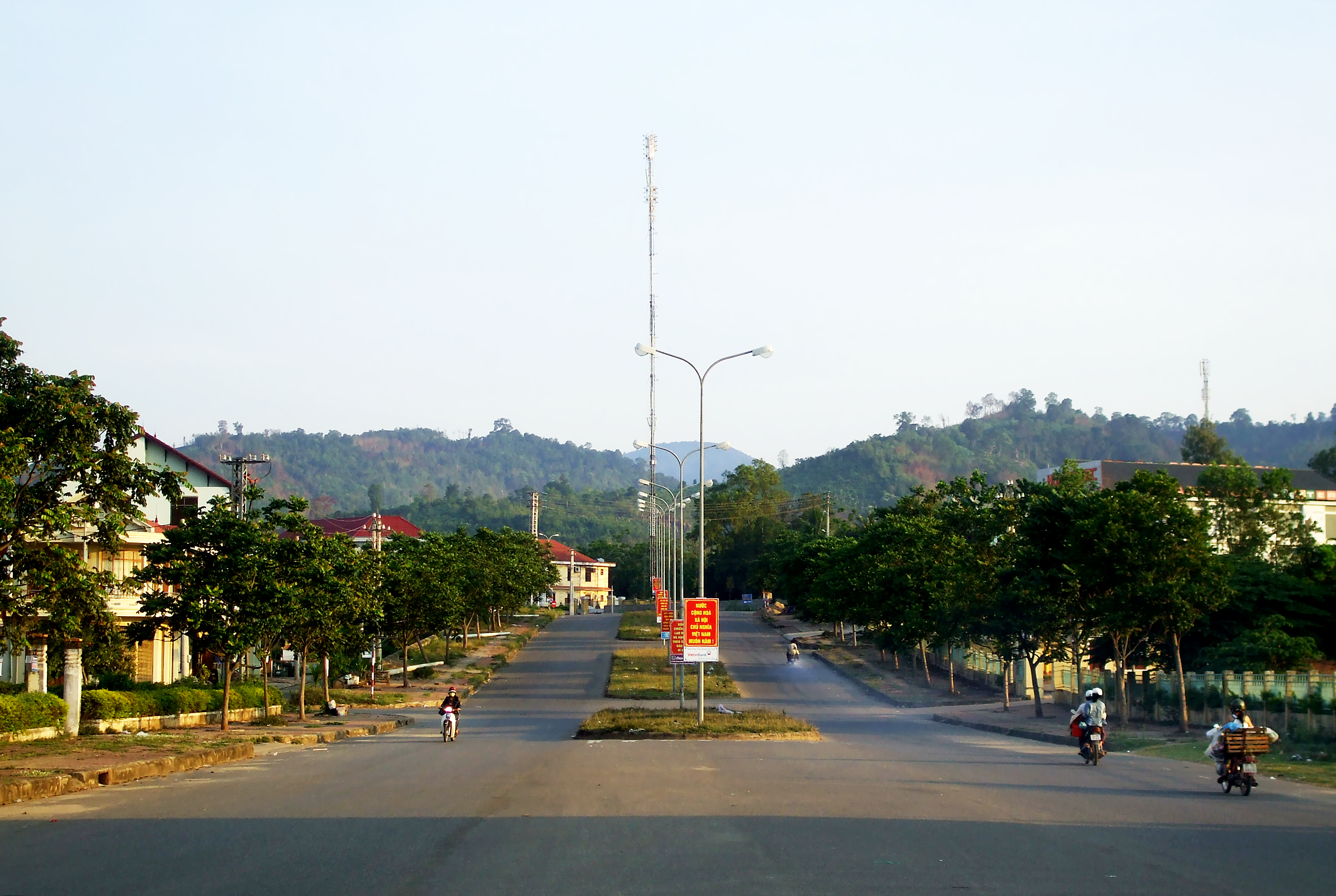 Một đại lộ ở thị trấn Lao Bảo, huyện Hướng Hóa, Quảng Trị, Việt Nam.